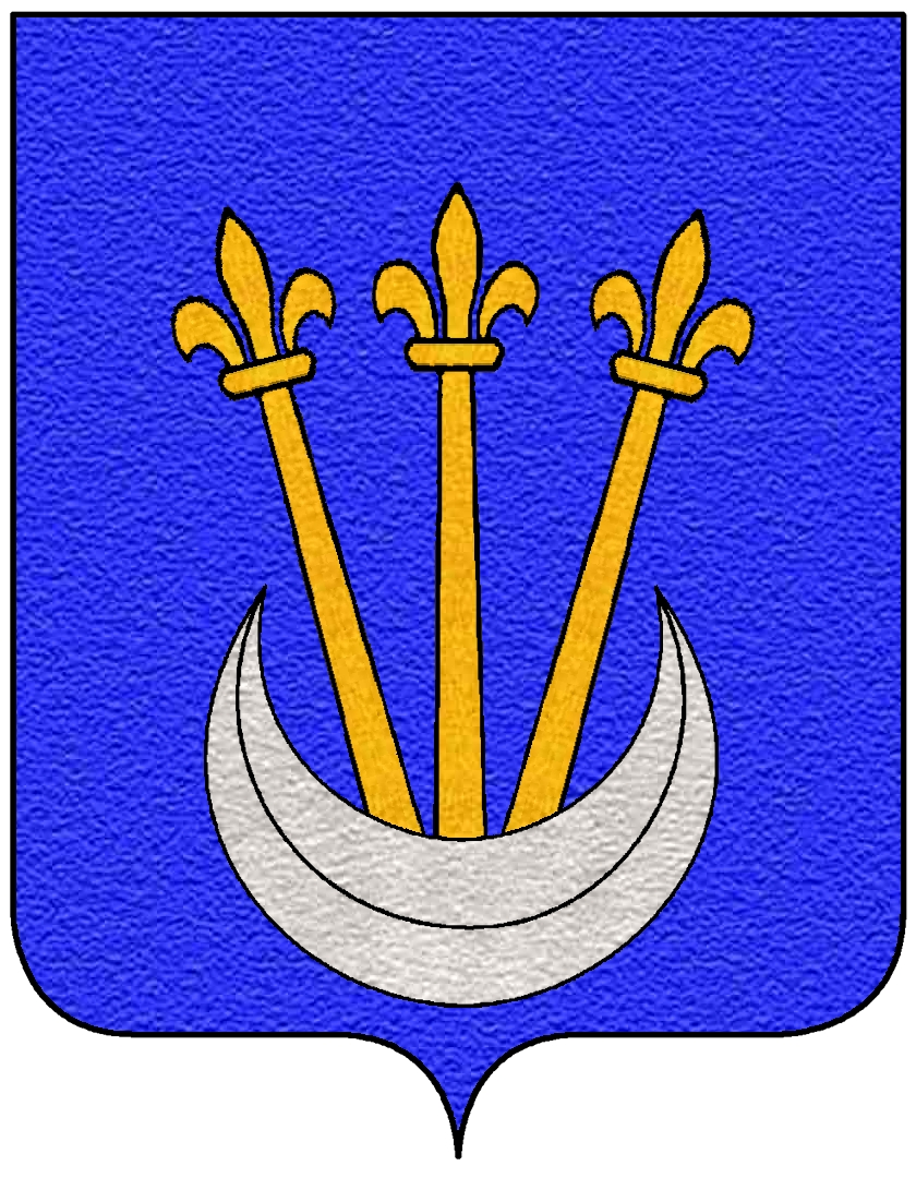 Stemma della famiglia Arlotti